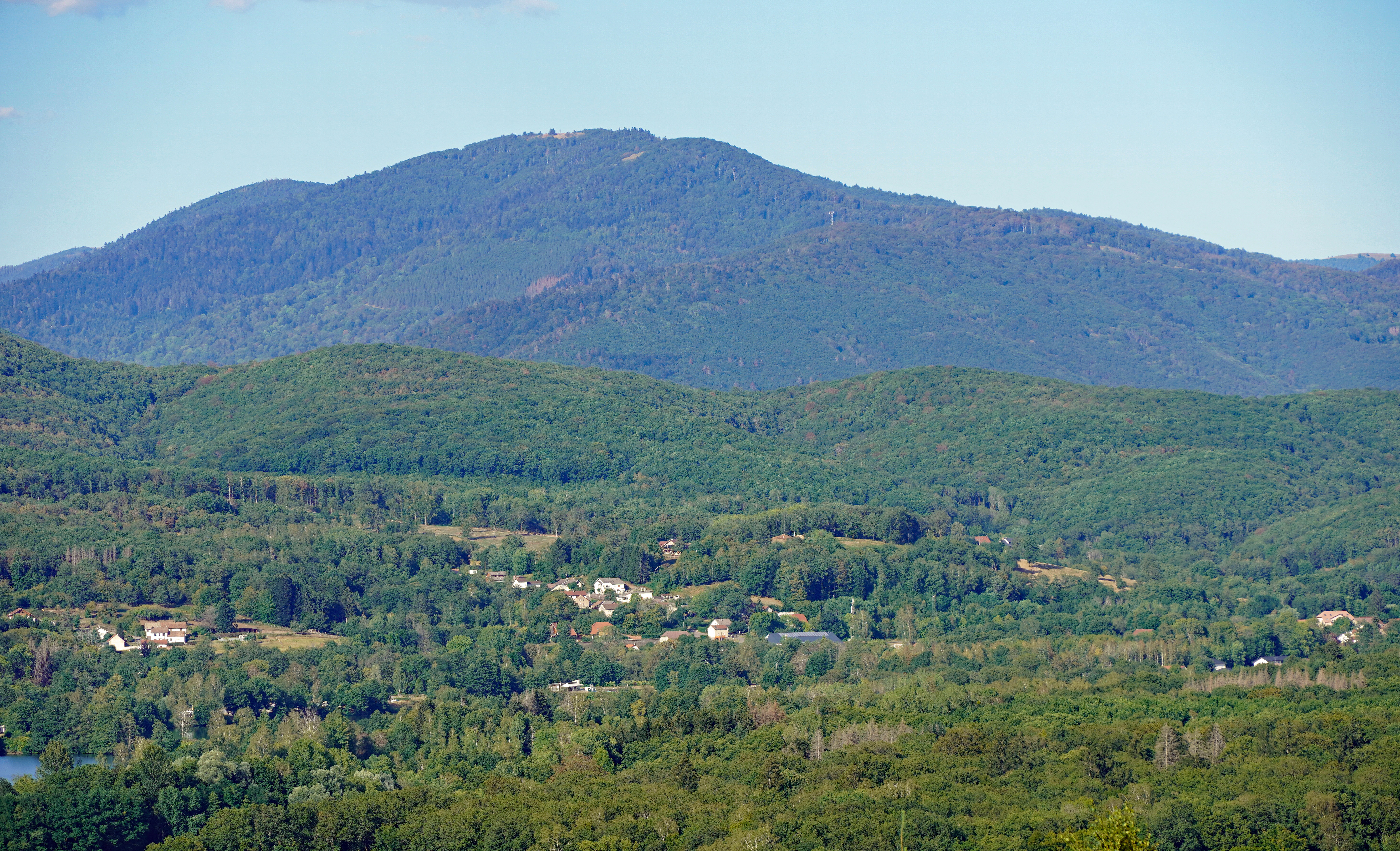 La Planche des Belles Filles vue depuis les hauteurs du Chérimont entre Ronchamp et Champagney.